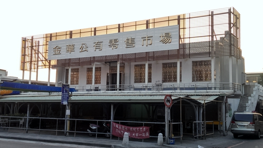 臺南市南區金華公有零售市場